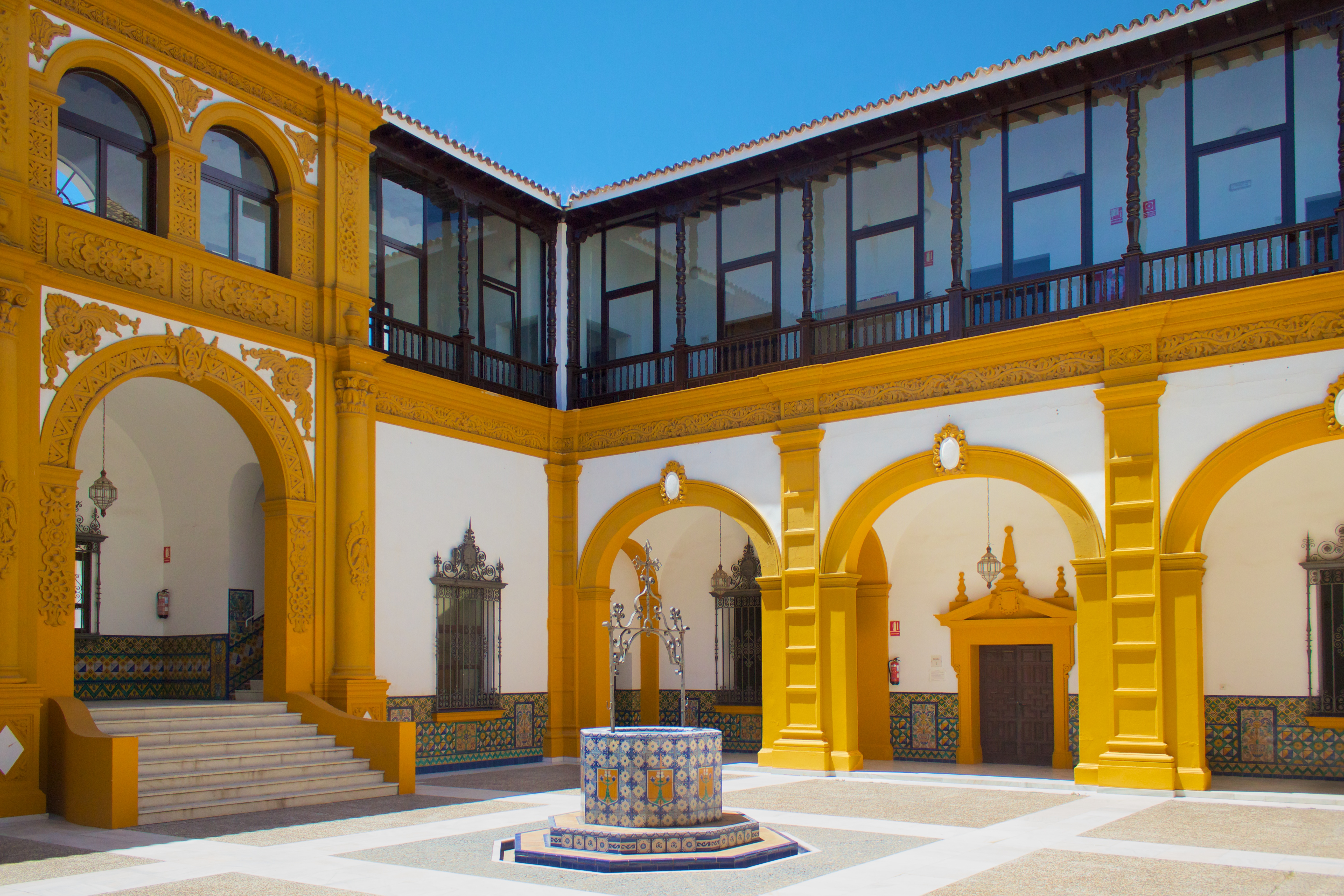 Patio interior del Pabellón de Argentina de la Exposición Iberoamericana de 1929 en Sevilla. Actualmente Conservatorio Profesional de Danza ‘Antonio Ruiz Soler’.